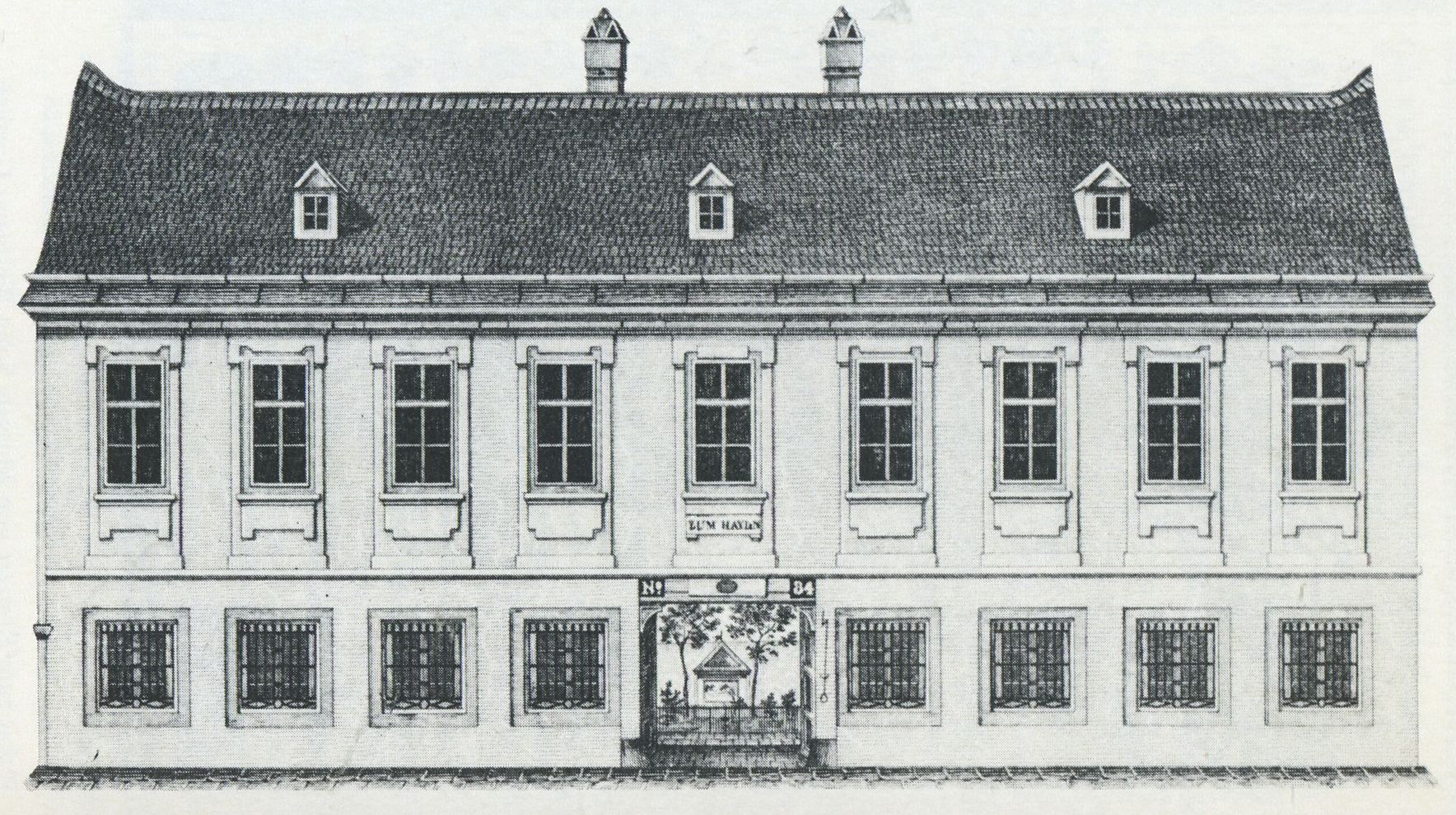 Foto des Hauses in dem Joseph Haydn zuletzt wohnte